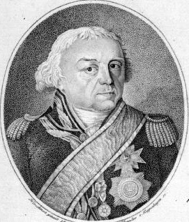 Joseph Maria von Weichs (1756-1819) bayerischer Kämmerer, Generalkommissär des Isarkreises